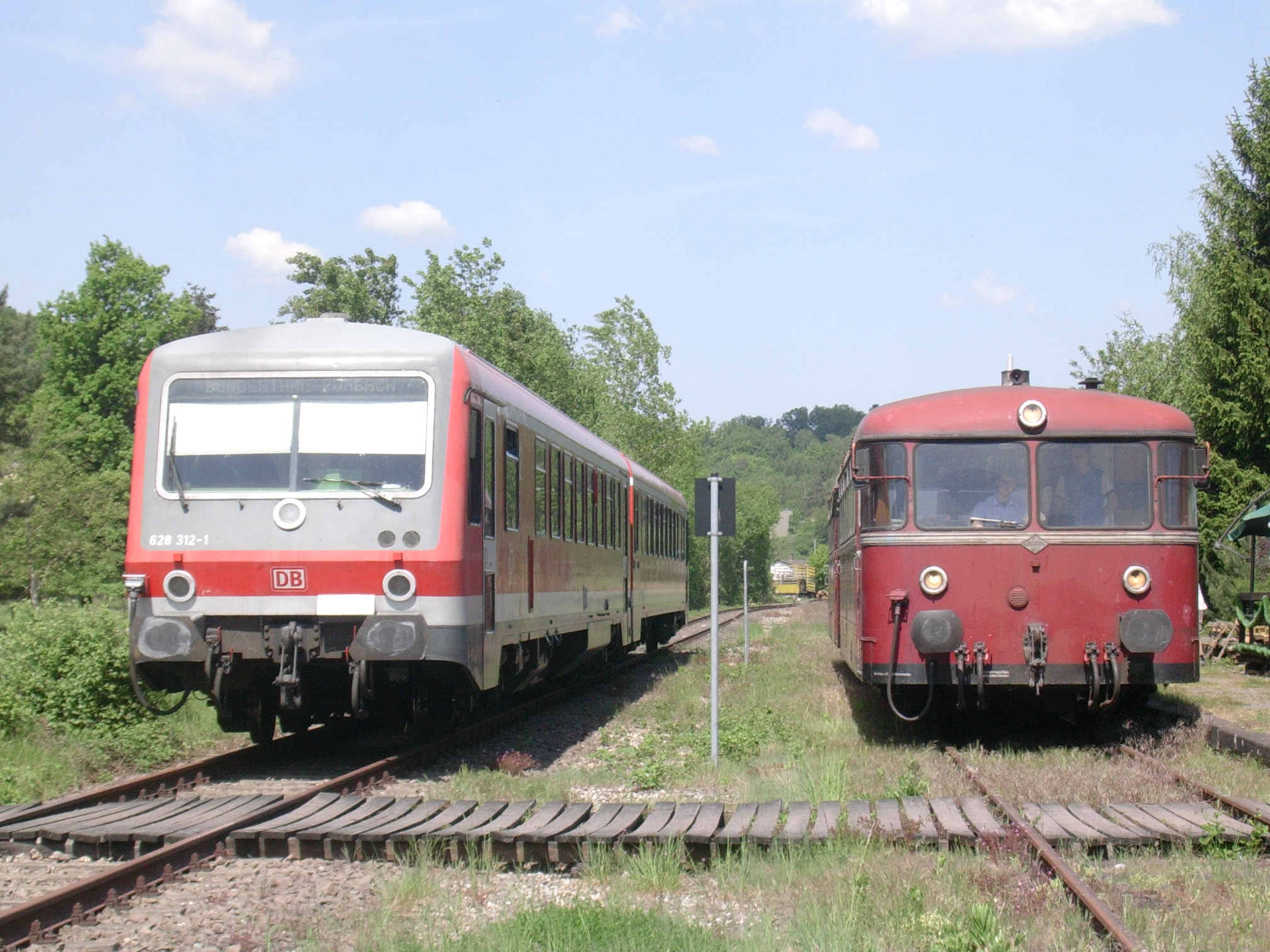 VT628 und VT798 auf der Wieslauterbahn in Bundenthal-Rumbach